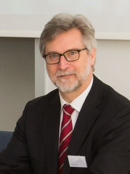 Der deutsche Kunsthistoriker Dietmar Popp.